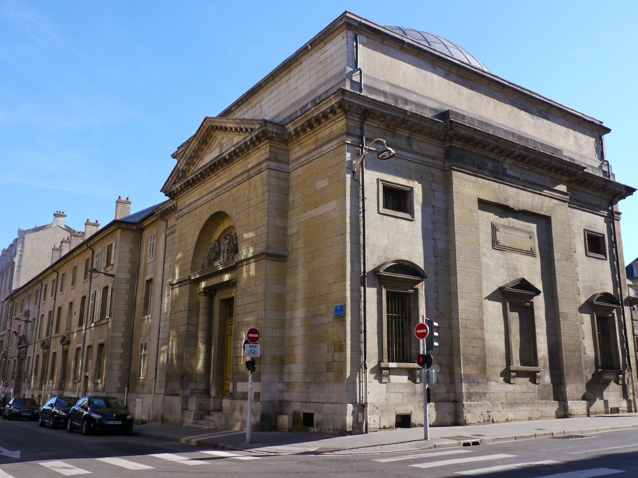 Couvent de la visitation de Nancy, première pierre posée en 1667 par le Duc Charles IV de Lorraine. La chapelle est réédifiée par les sœurs de la Visitation entre 1780 et 1782. .